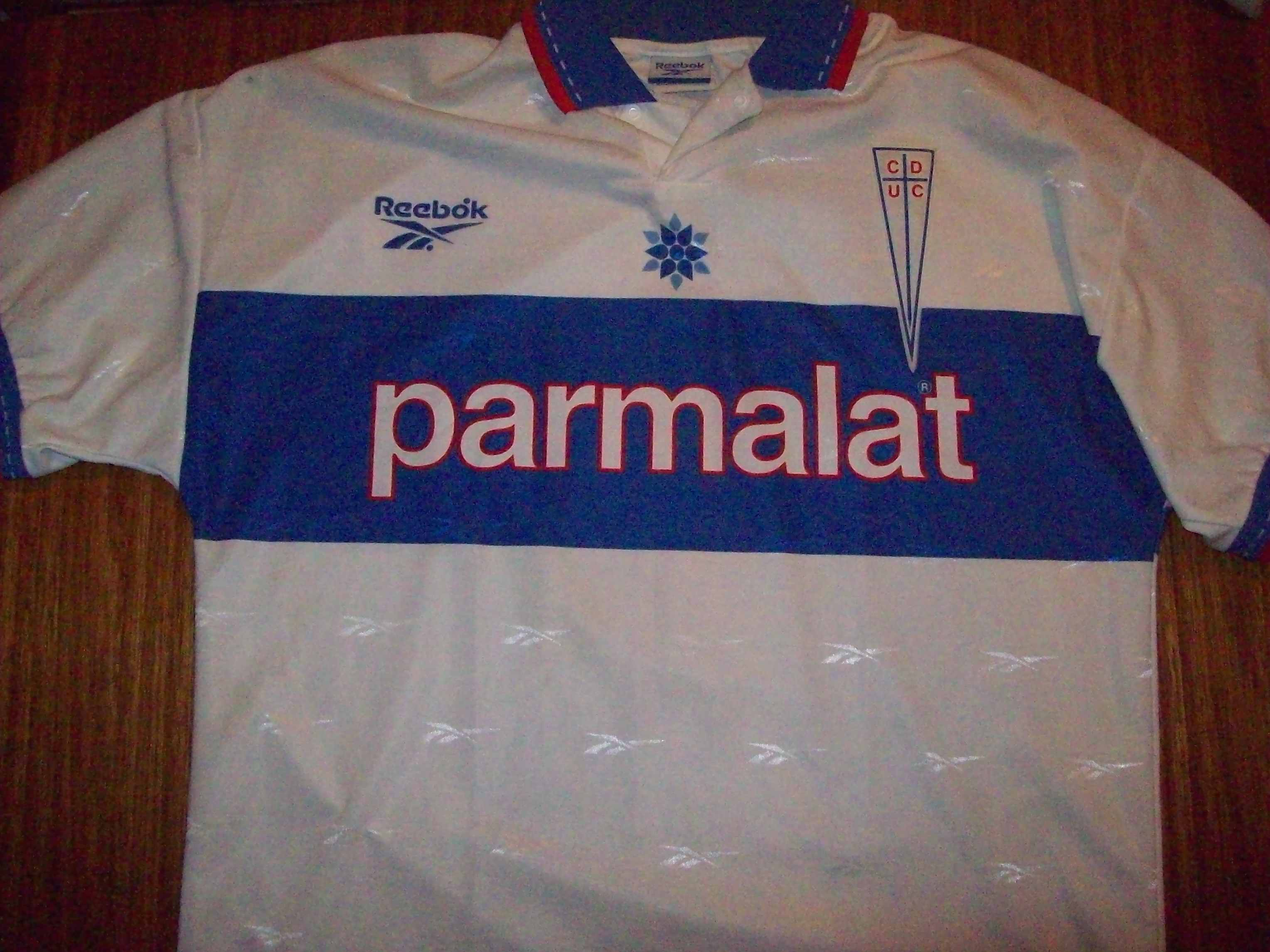 Camiseta oficial de Universidad Católica entre los años 1998 y 1999.